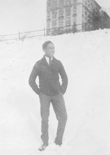 Source: Downloaded from Search:Langston Hughes Courtesy of the Yale Collection of American Literature,Beinecke Rare Book and Manuscript Library CALL NUMBER: JWJ MSS 26 BOX: 458 FOLDER: 11064 SOURCE TITLE: Langston Hughes at Central High School (Cleveland) ITEM DATE: 1916-1920 REPRO TYPE: 5x7 bw neg CREDIT LINE: Yale Collection of American Literature, Beninecke Rare Book and Manuscripte Library BEINECKE FILE HEADING: Hughes, Langston/39002037249272